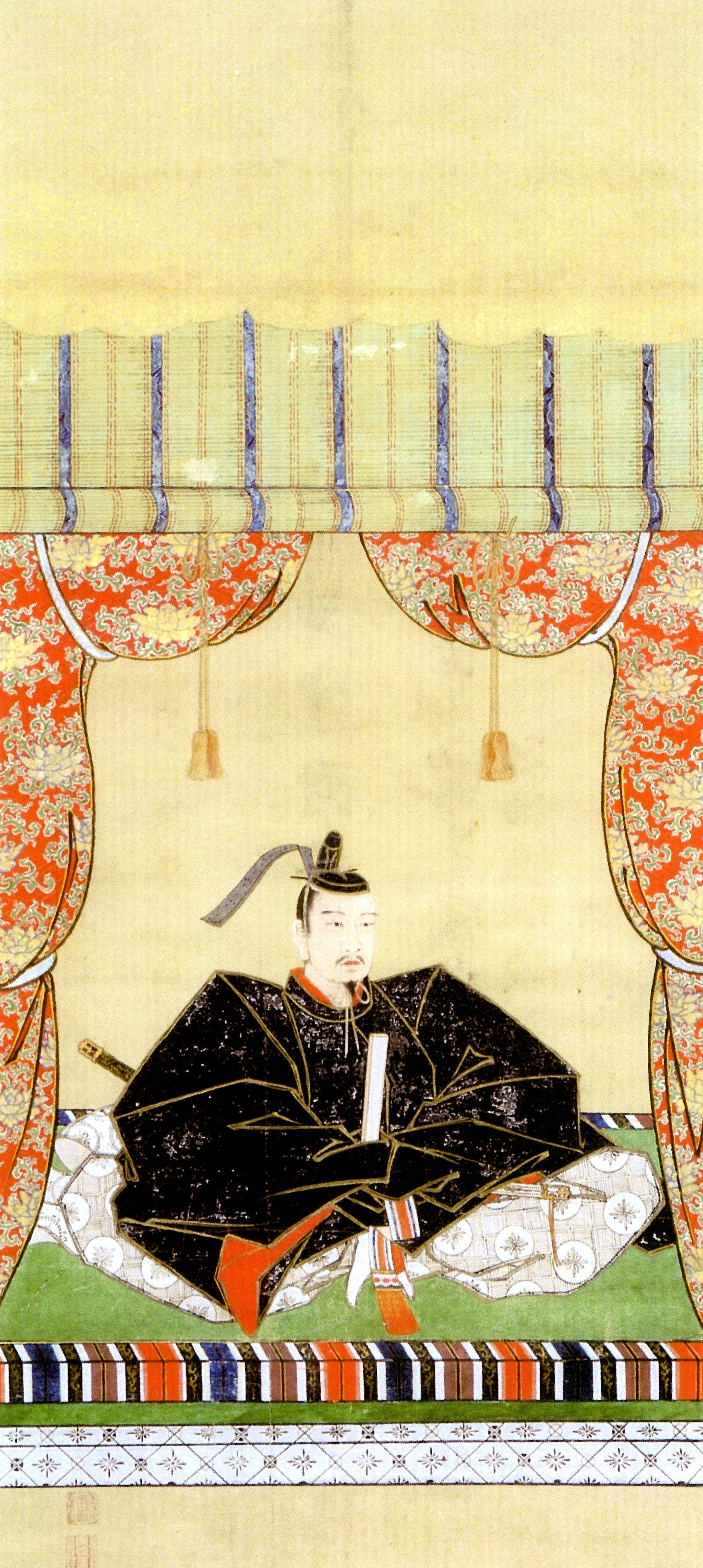 加藤忠広の肖像。